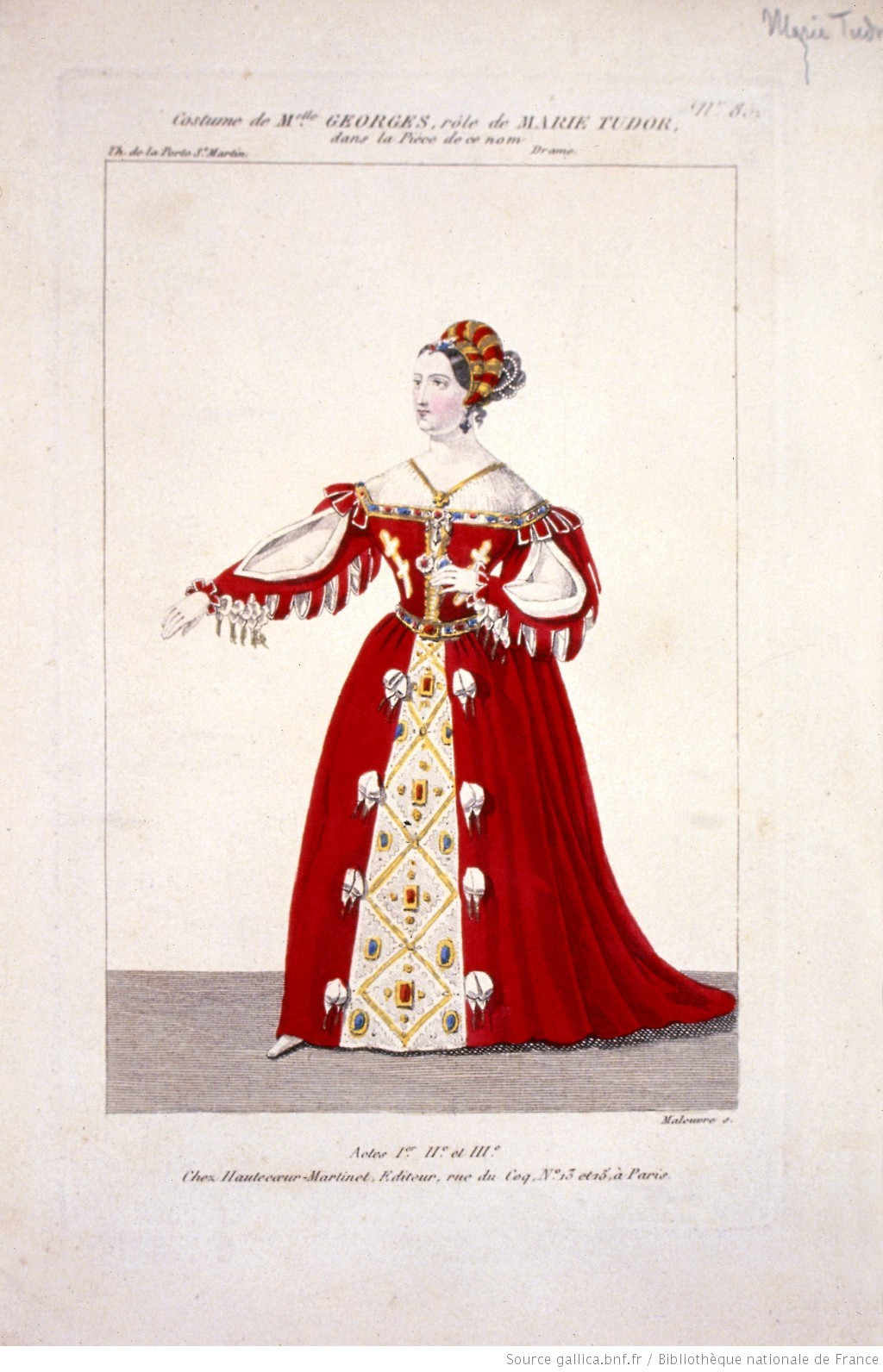 Titre : [Marie Tudor : lot d'estampes] Éditeur : Hautecoeur Martinet (Paris) Date d'édition : 1833 Format : Rec. factice ; 23 x 14,5 cm Identifiant